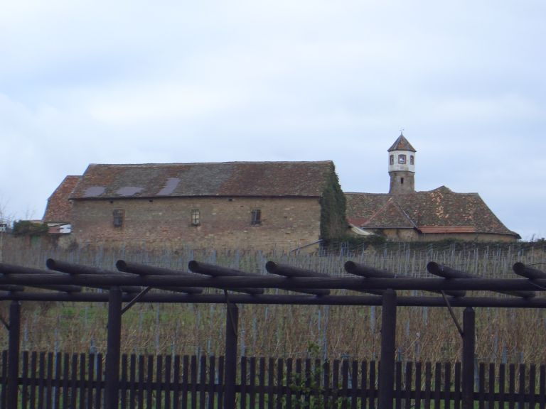 Kloster Heilsbruck (Edenkoben) Fotograf: Uwe Schwöbel